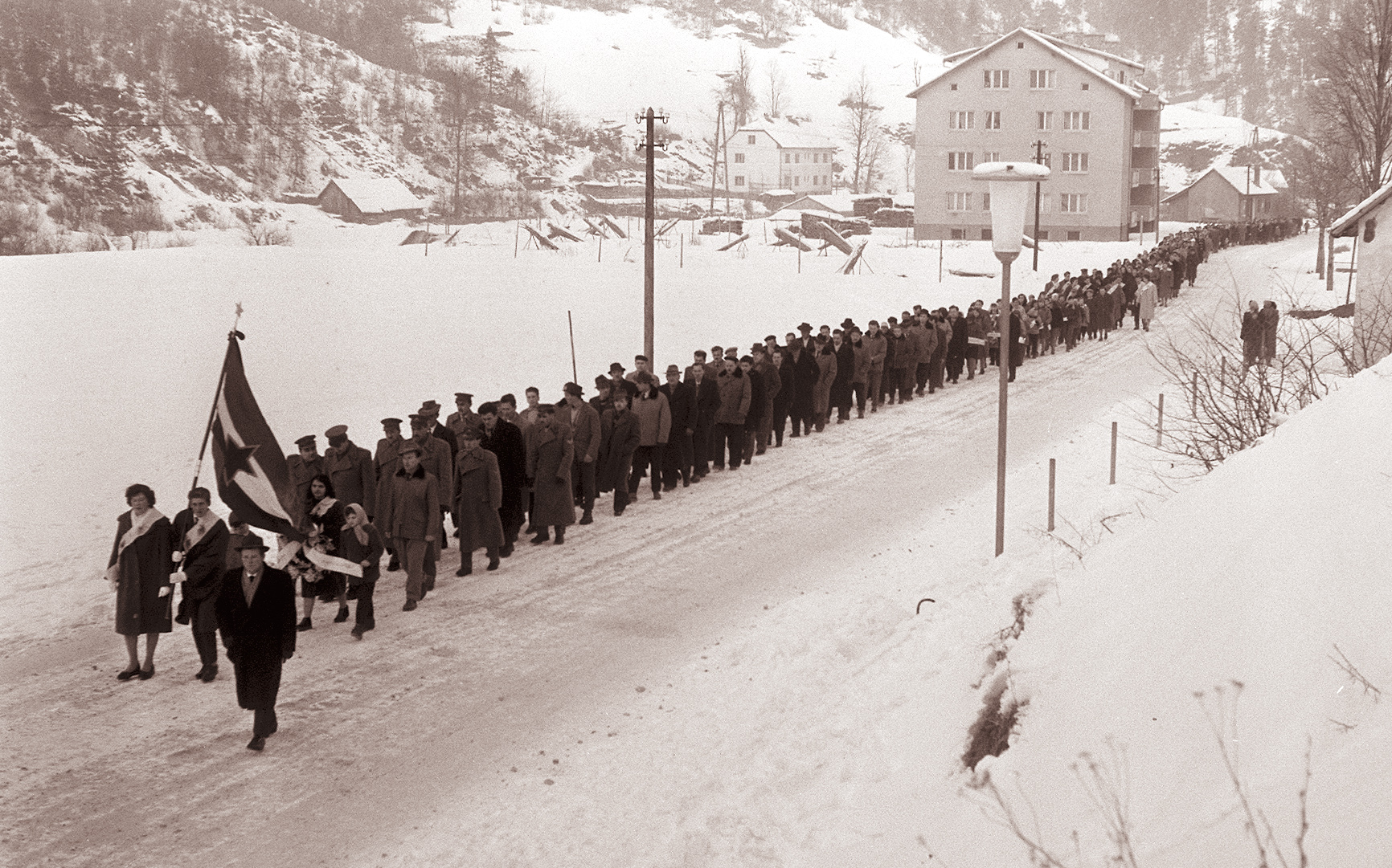 Pogreb otrok v Črni na Koroškem. 24. januar 1961,Črna na Koroškem: Včeraj popoldne so v Črni na Koroškem pokopali Zorico in Miroslava, otroka Mile Radoševič, ki sta se v soboto dopoldne zadušila z ogljikovim monoksidom. Tragična nesreča se je pripetila, ko je mati odšla od doma, oba otroka pa pustila zaklenjena v sobi, v kateri je zakurila lončeno peč. Ko se je mati vrnila, je bila soba polna gostega, črnega dima. Drva, naložena za pečjo, so namreč začela tleti. Otroka Miroslav, star 2 leti, in Zorica, stara 4 leta, sta ležala negibna, eden na divanu, drugi na tleh. Mati je otroka takoj odnesla na hodnik pred stanovanjem,od tam pa v bolnišnico, oddaljeno od stanovanja pet minut. Vendar je zdravnik lahko ugotovil samo smrt. Na sliki: Včeraj je več kot tisoč ljudi spemilo na pokopališče malega Mirosava in Zorico Radoševič, ki sta izgubila življenje v tragični nesreči.